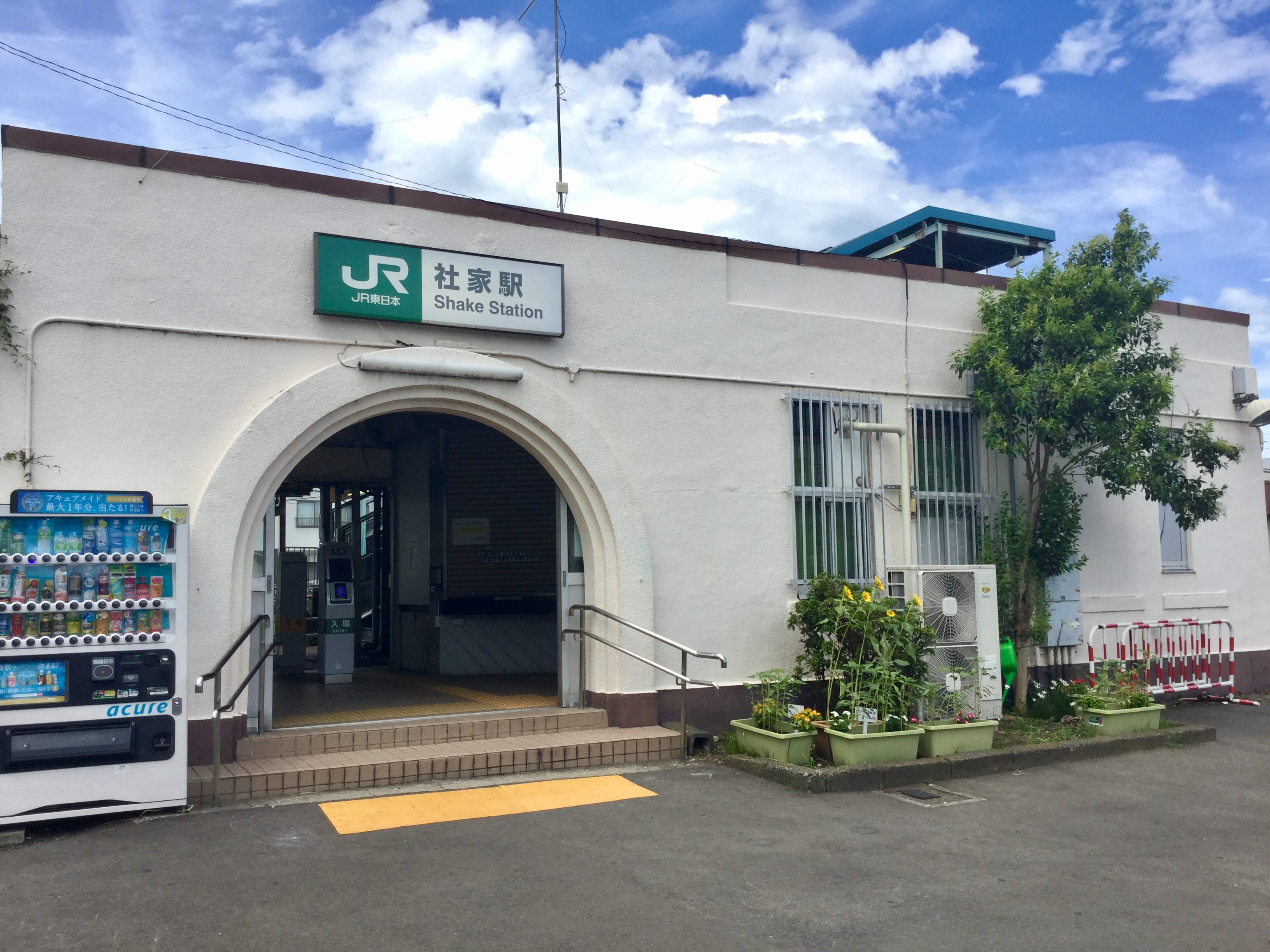 社家駅の駅舎